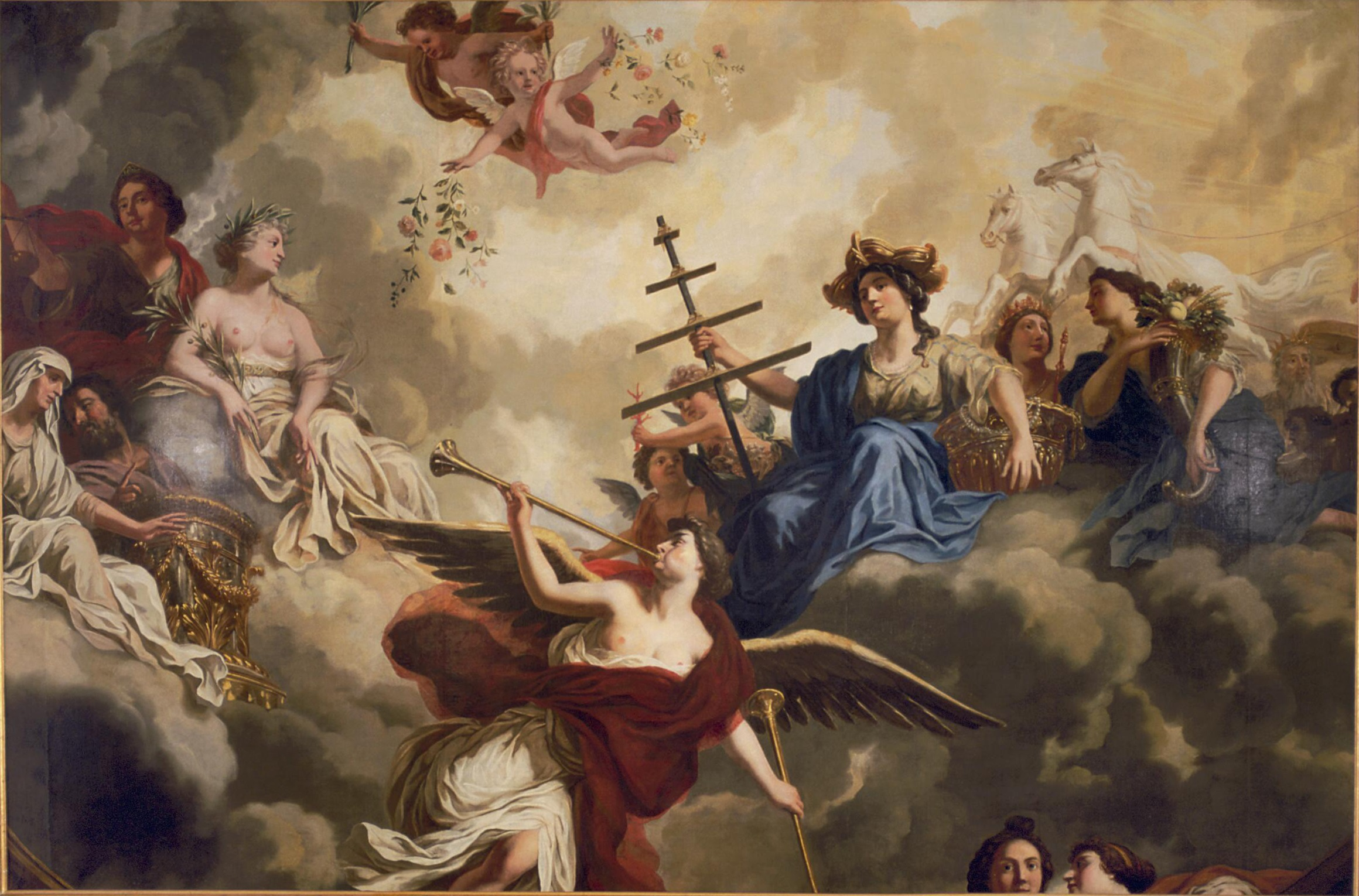 Allegorie op de zeevaart. oil on canvasmedium QS:P186,Q296955;P186,Q12321255,P518,Q861259. Height: 250 cm (98.4 in); Width: 380 cm (12.4 ft) dimensions QS:P2048,250U174728;P2049,380U174728. Den Haag, privéverzameling. Vroeger Rijksmuseum Amsterdam (SK-A-2716).